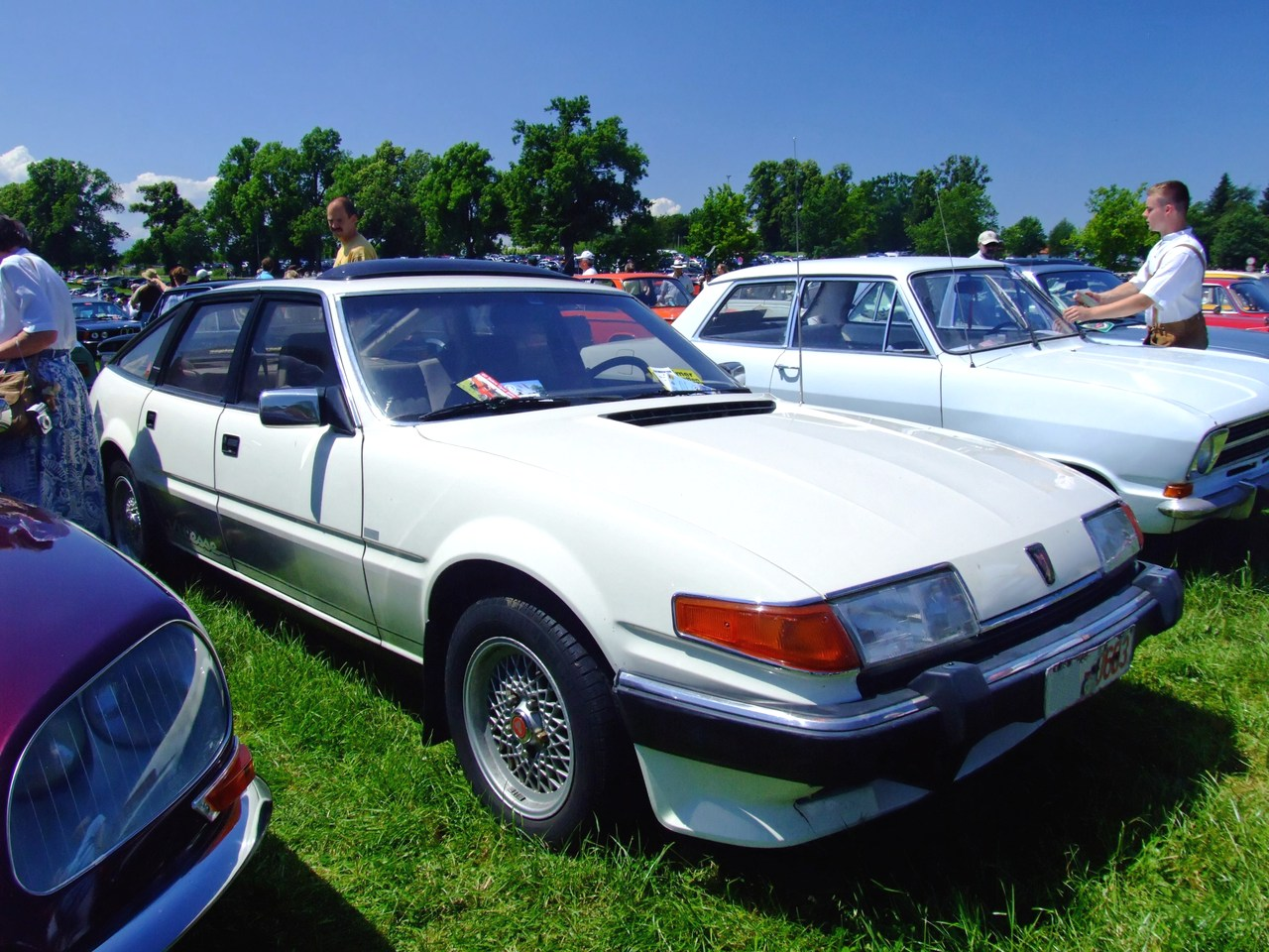 Quelle: selbst fotografiert, 06/2007 Fotograf: Späth Chr.